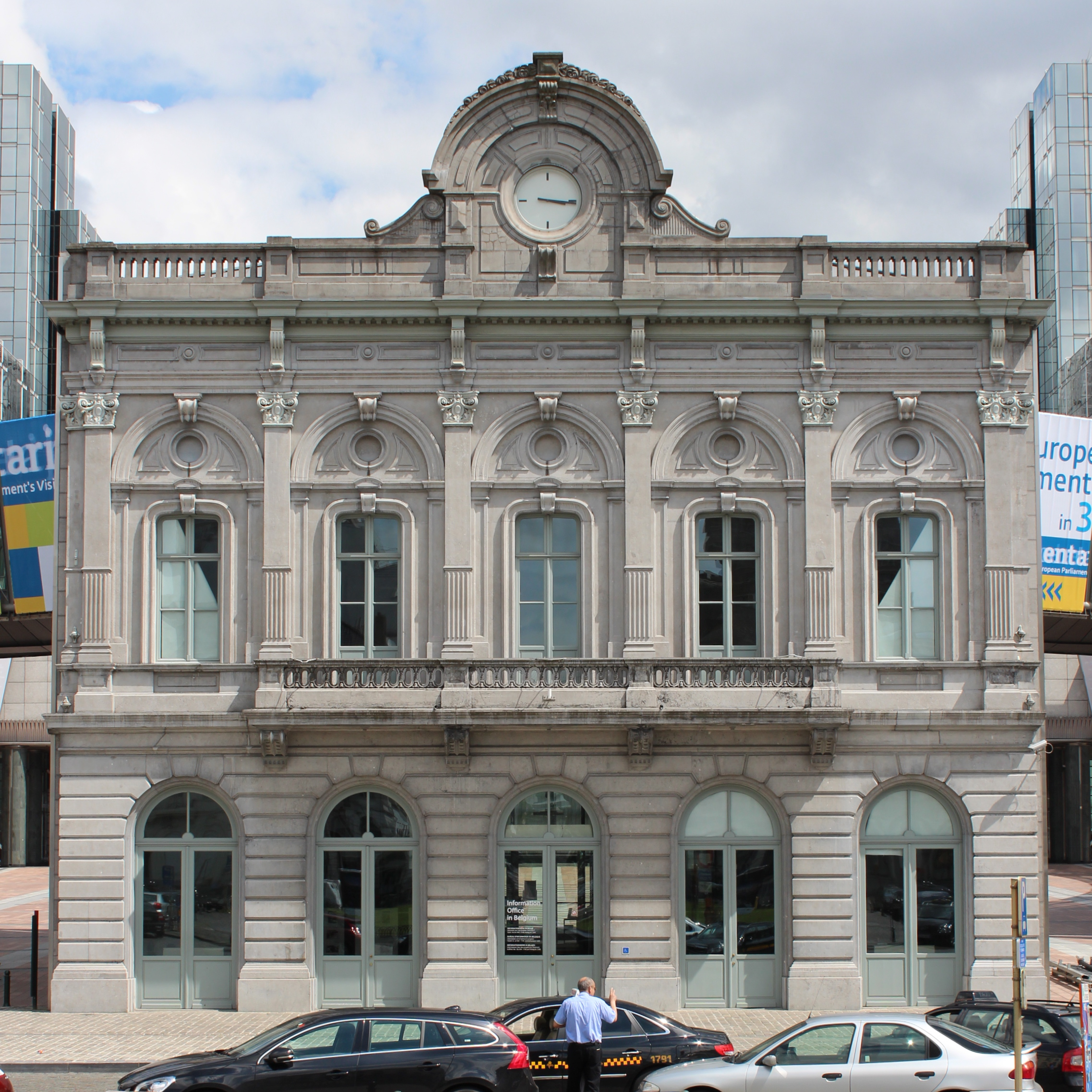 Luxemburg Station Leopoldwijk - Gare du Luxembourg Quartier Léopold Brussels.